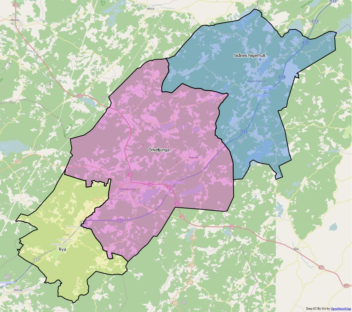 Distriktsindelningen i Örkelljunga kommun World file 49.04177370737011188 0 0 -49.04177370737011188 1457705.00423219171352684 7645515.2183723384514451